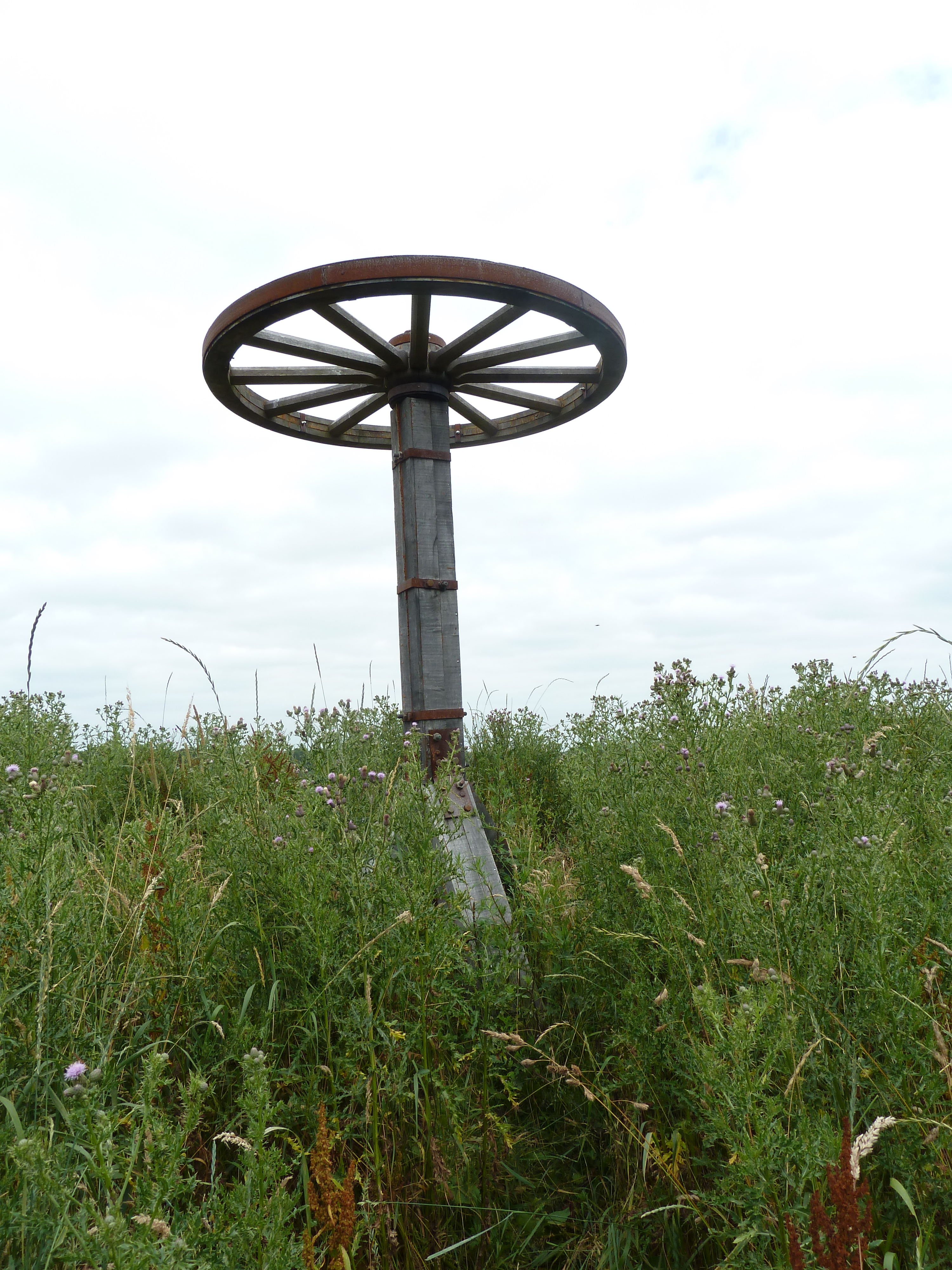 Grietjens Gericht, Beesel, Limburg, Nederland